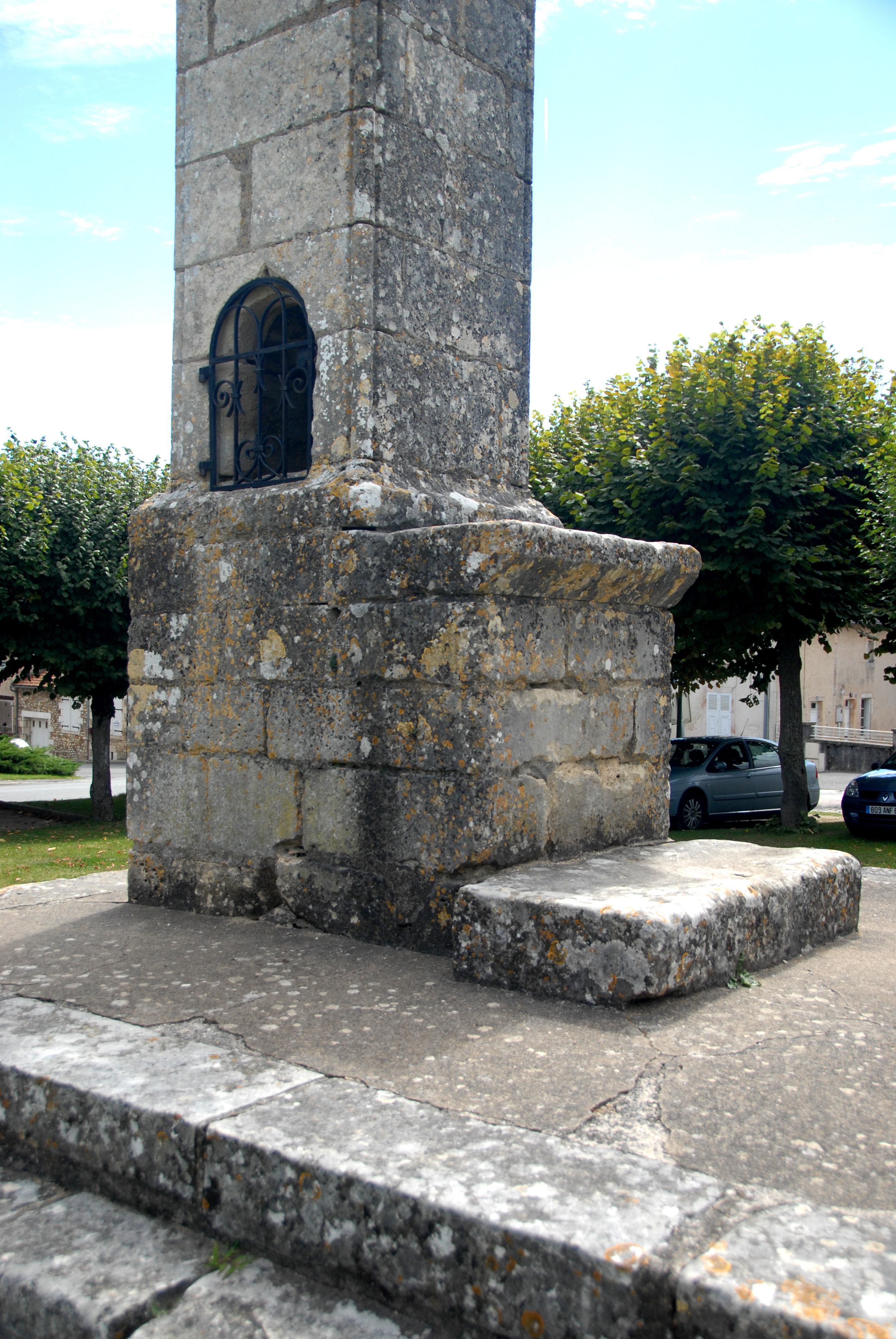 Totenlaterne, Altar u. seitl. Türf